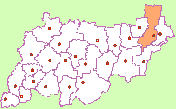 Kostroma Oblast map by Al Silonov Карта районов Костромской области